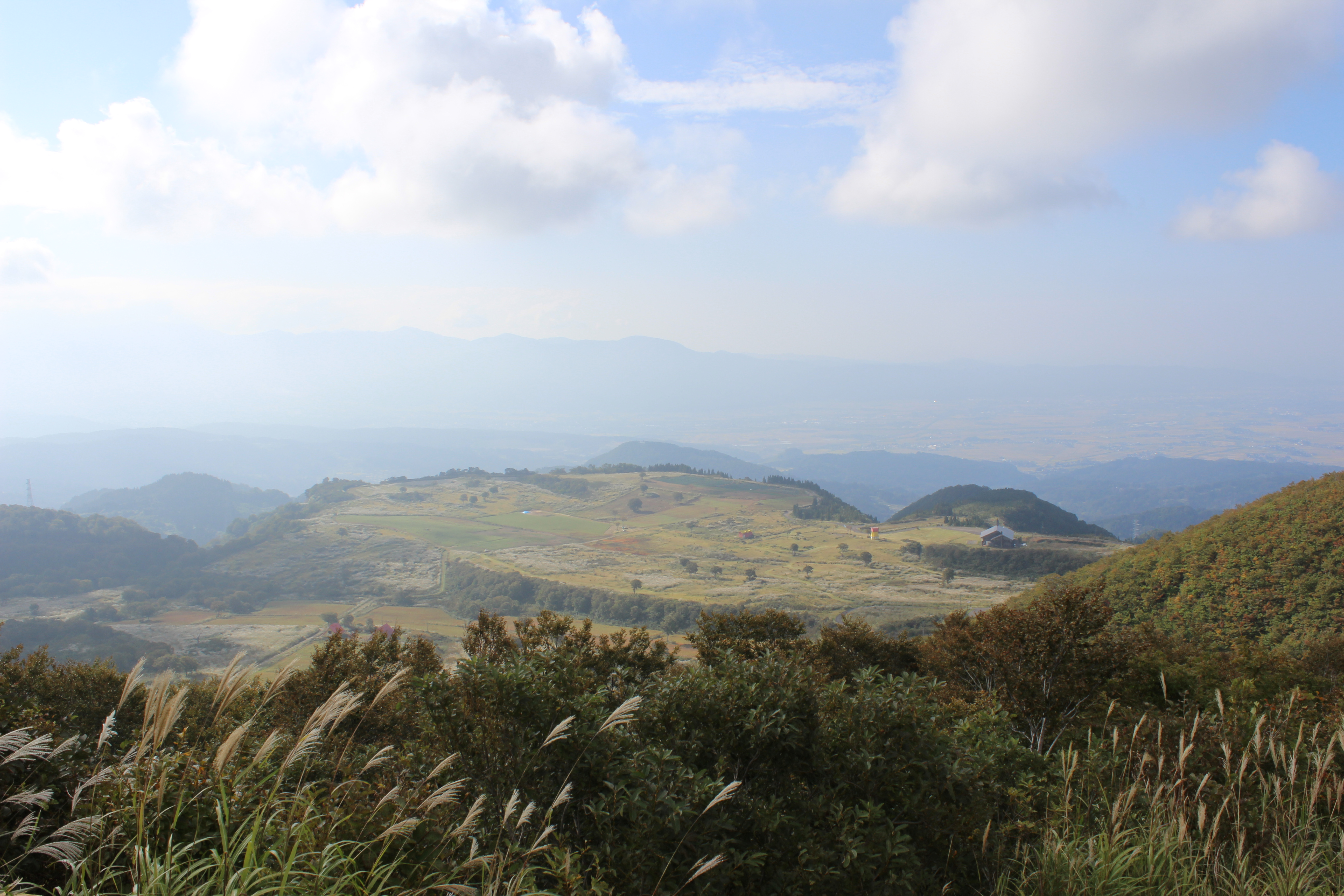 グリーンパル光原荘より望む光ヶ原高原。新潟県上越市板倉区。